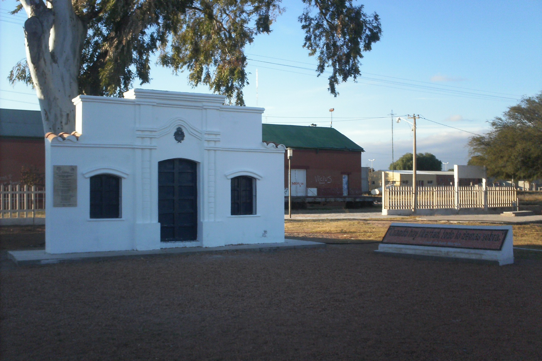 monumento al bicentenario en la entrada al pueblo